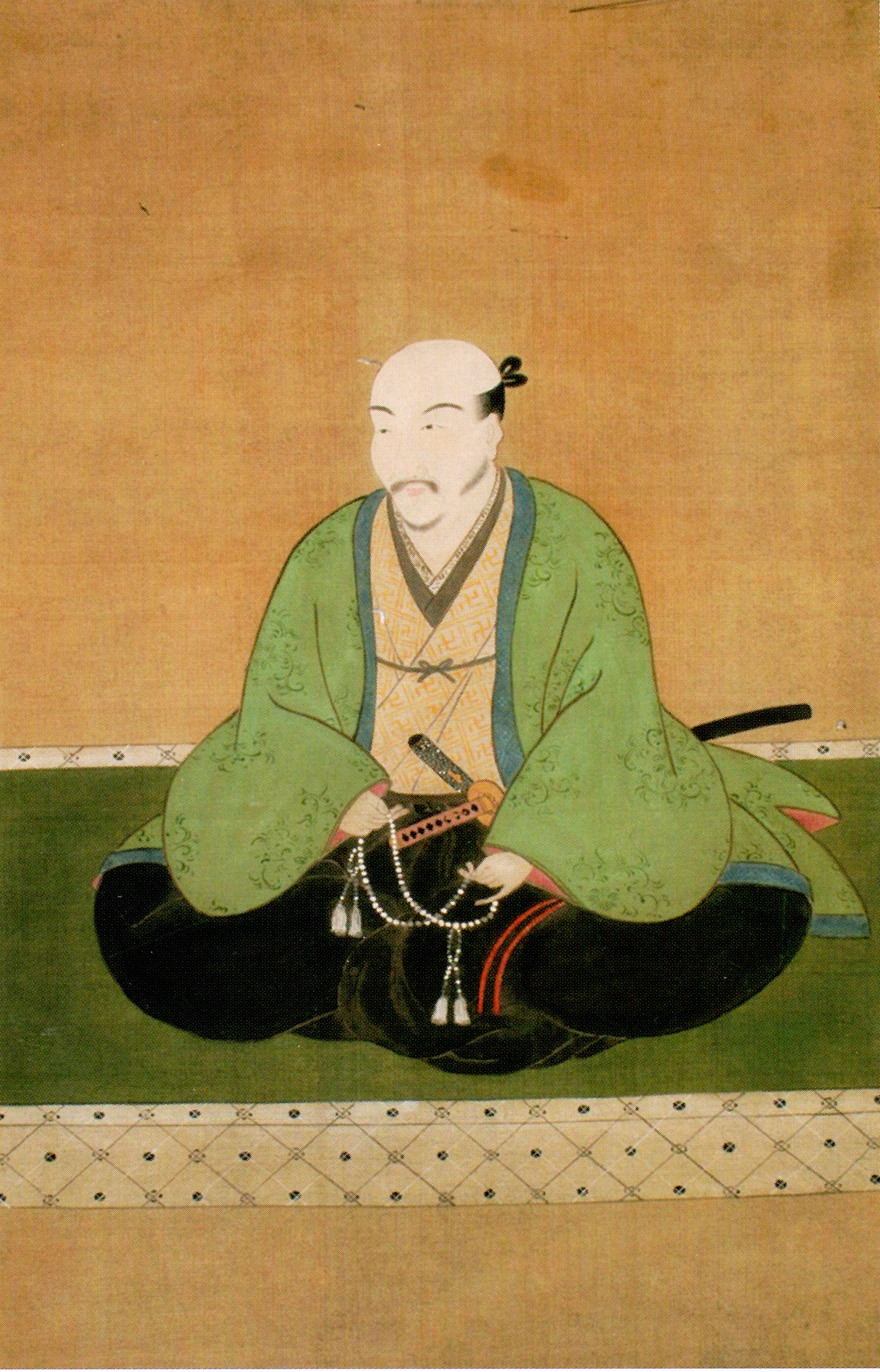 村井長次の肖像。